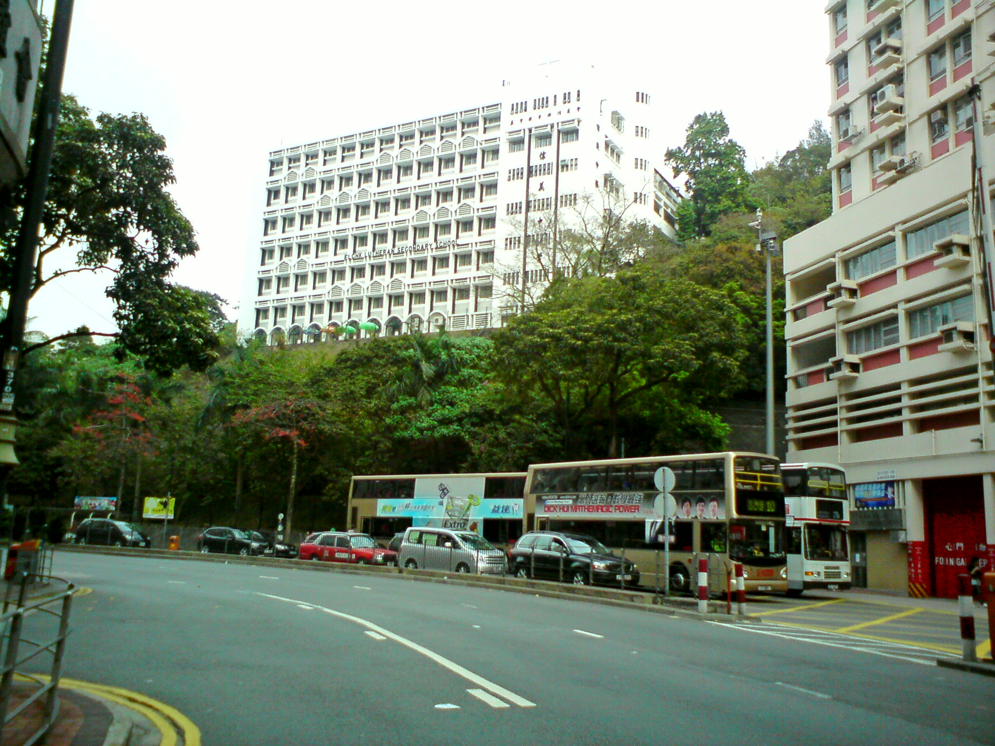 油麻地